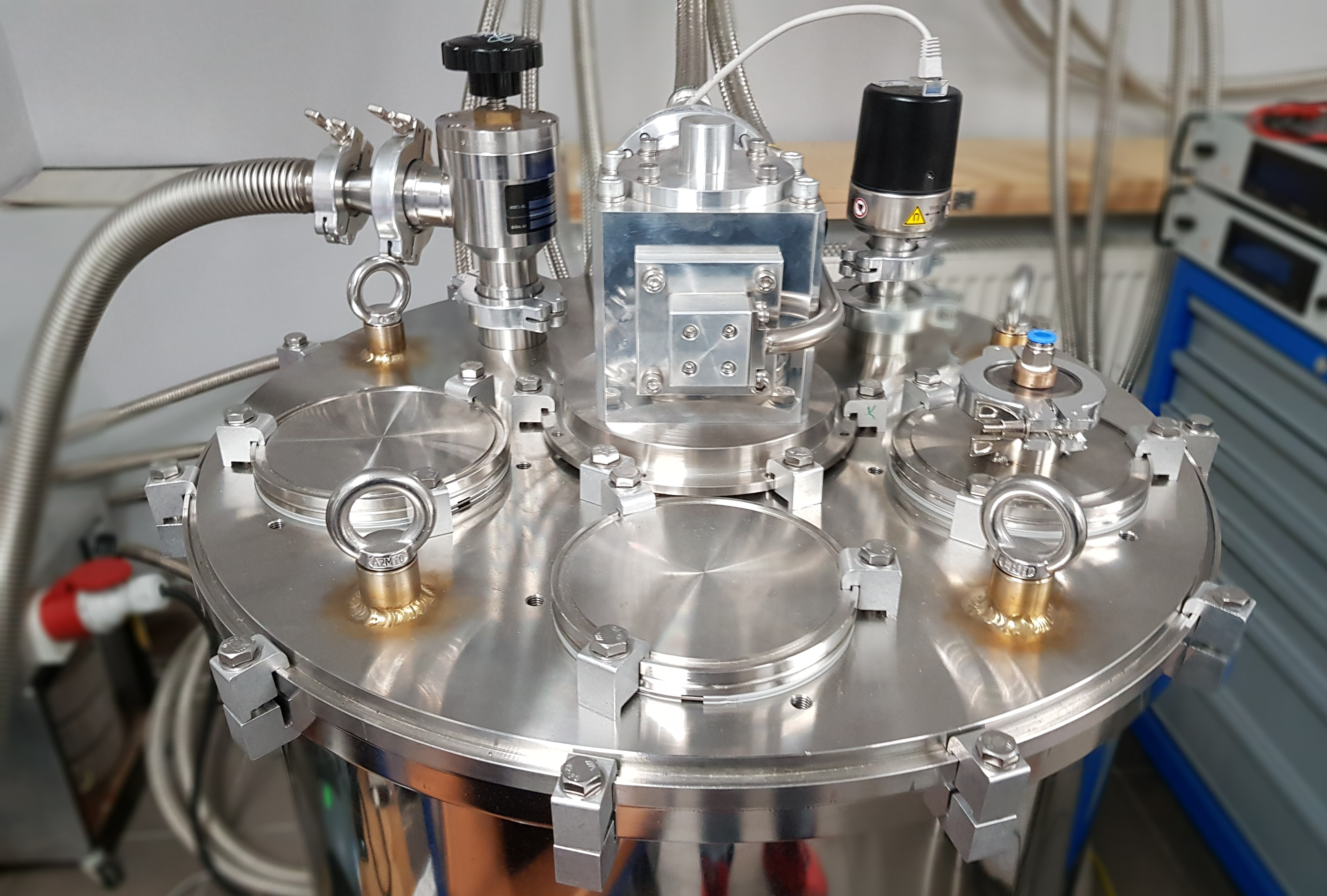 Kriostat testowy, badający szczelność podzespołów w niskich temperaturach firmy Frako-Term.